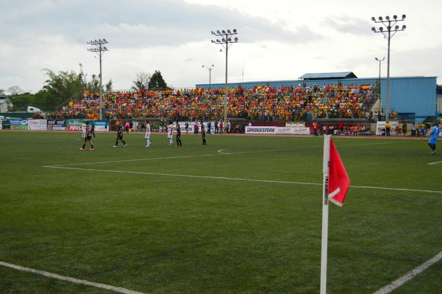 Polideportivo de Belén en un encuentro Belén-Herediano